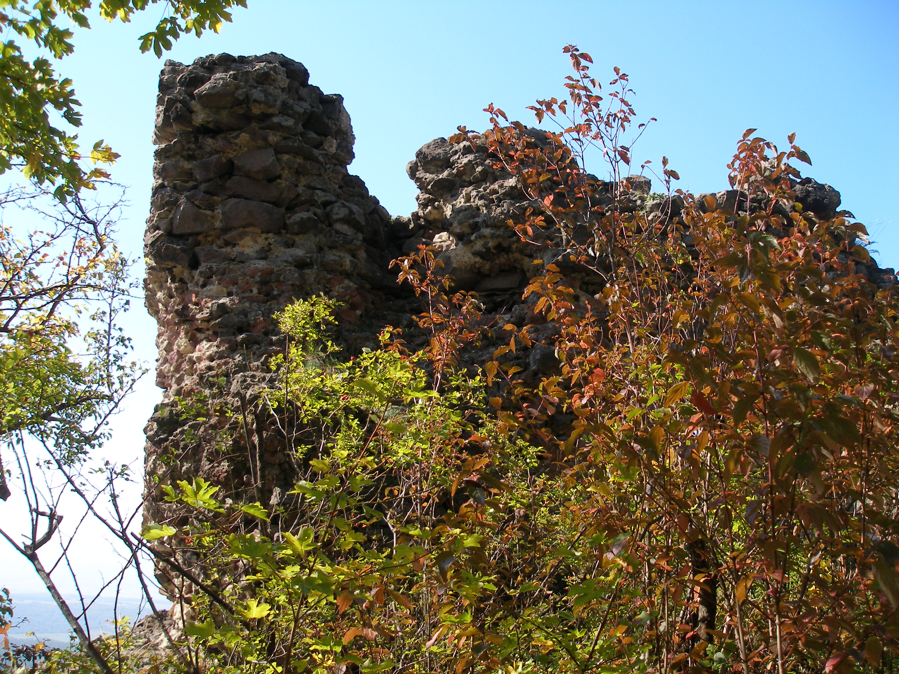 Štátna prírodná rezervácia Zbojnícky zámok nad obcou Ruská Nová Ves, okres Prešov, región Šariš.